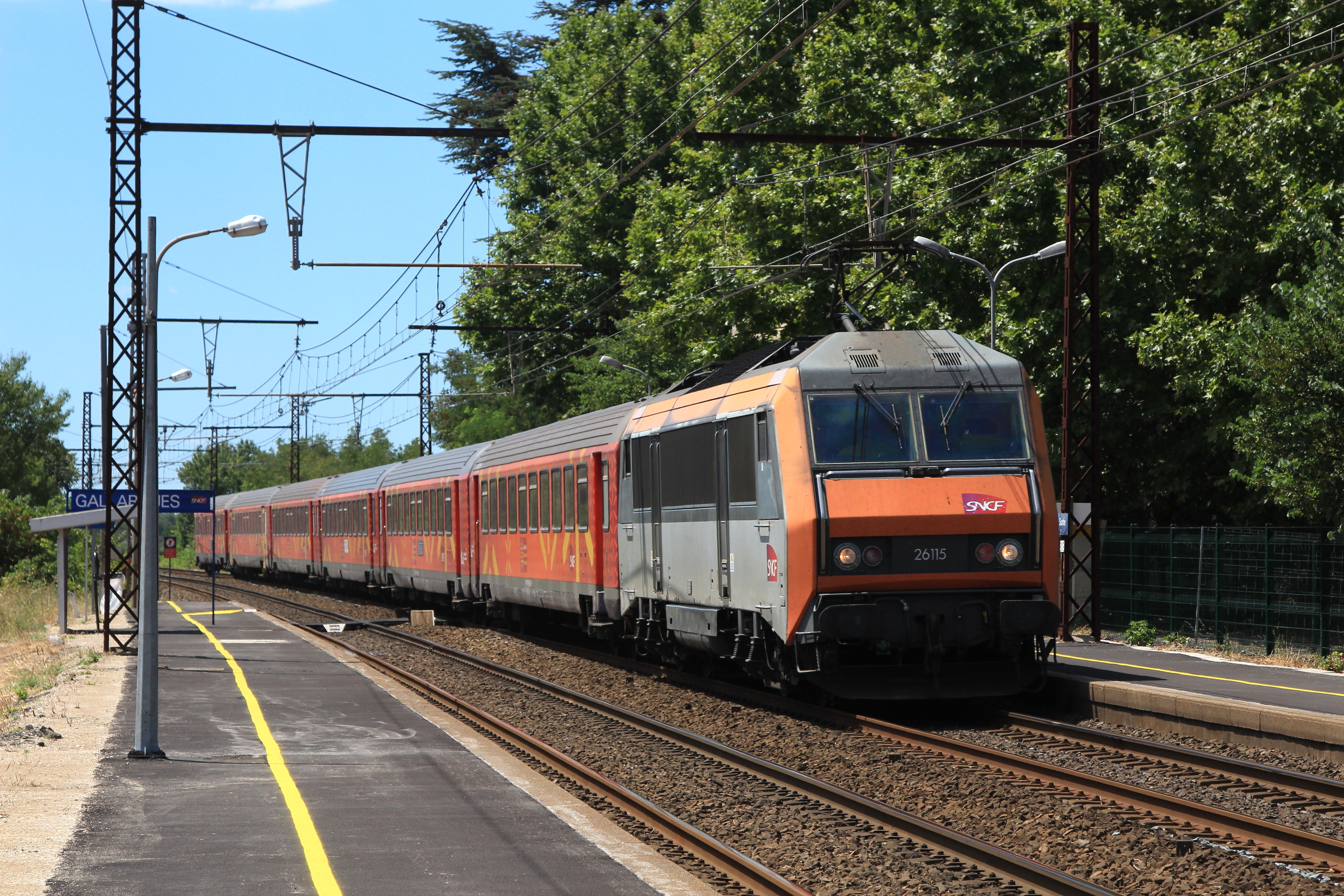 La BB 26115 tirant 6 voitures Corail en livrée TER Languedoc-Rousillon passe sans arrêt en gare de Gallargues, assurant le TER n° 876414 (Perpignan - Avignon).